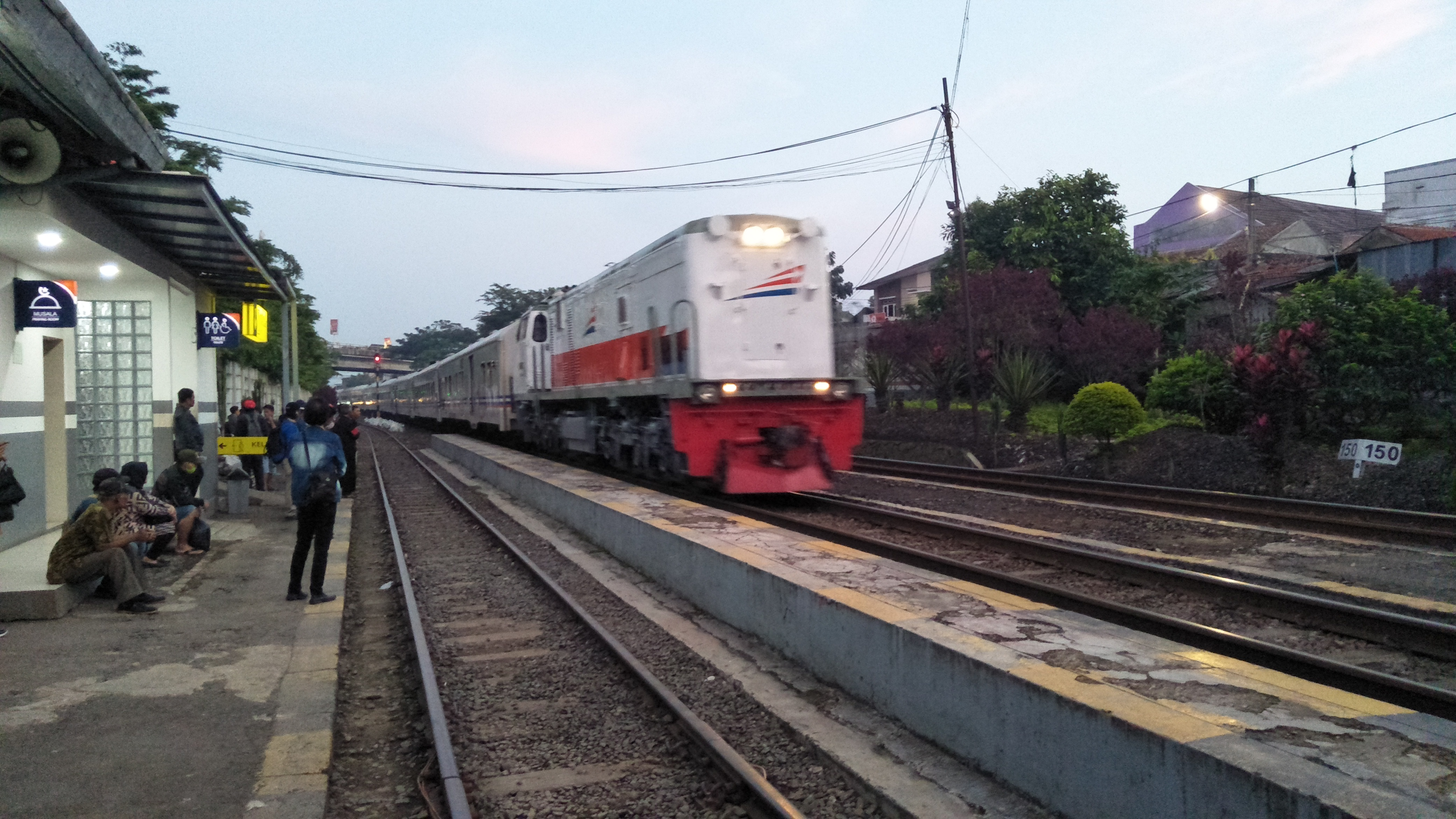 KA lokal Bandung Raya di stasiun Cimindi